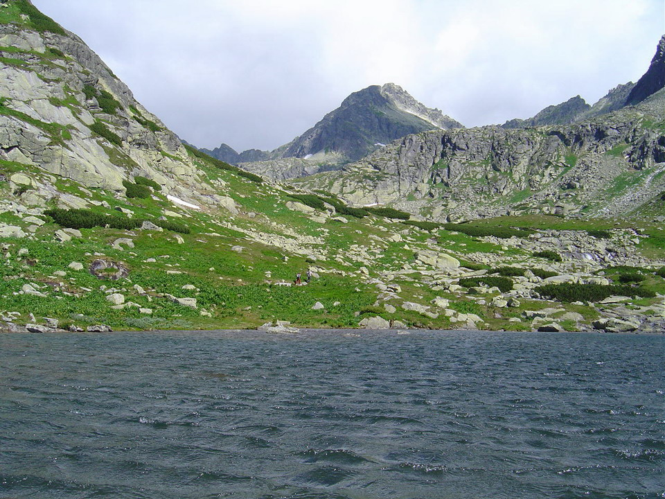 Strbsky stit over Pleso nad Skokom